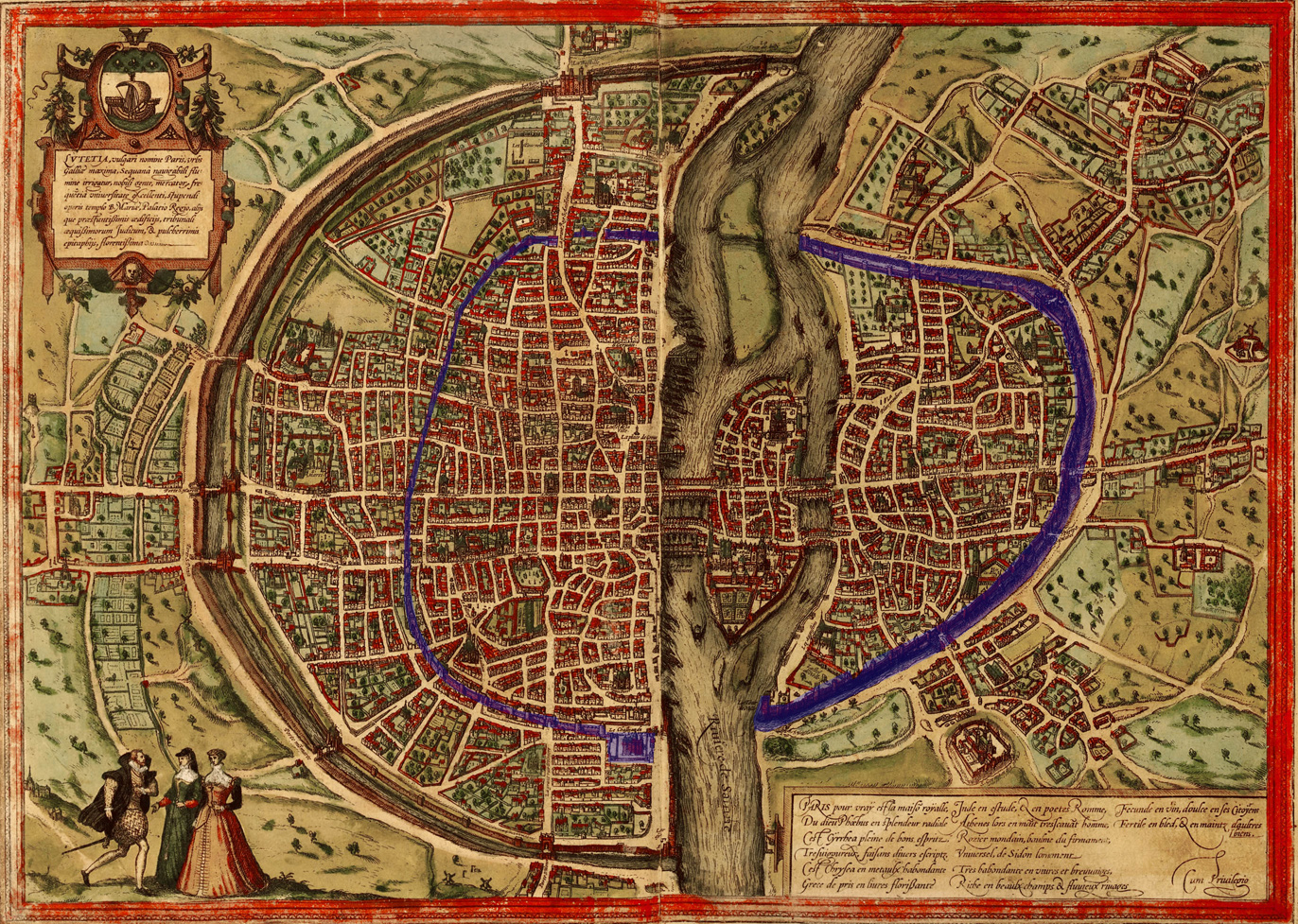 Paris, Carte de Braun & Hogenberg de 1572